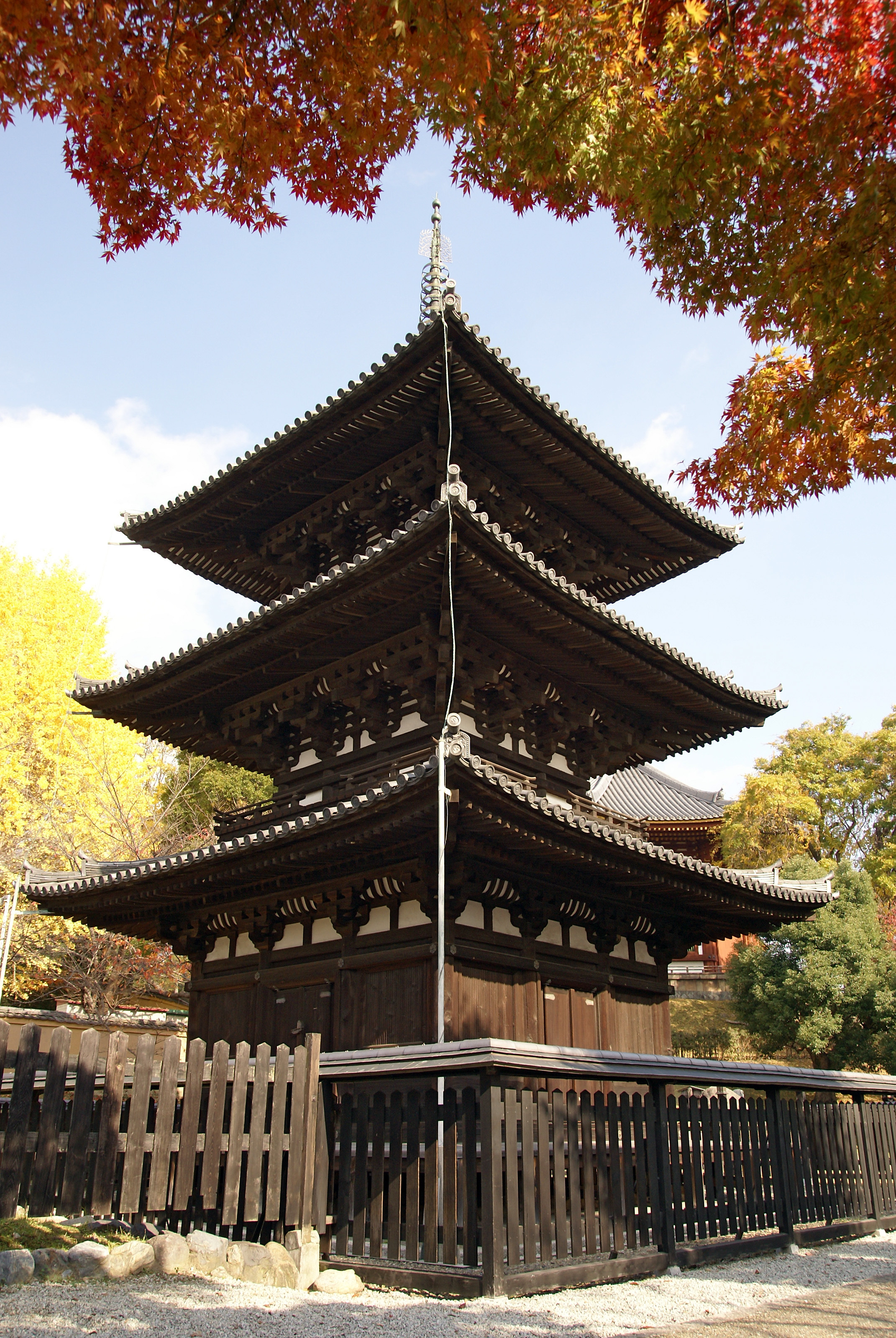 Kofukuji in Nara, Nara prefecture, Japan